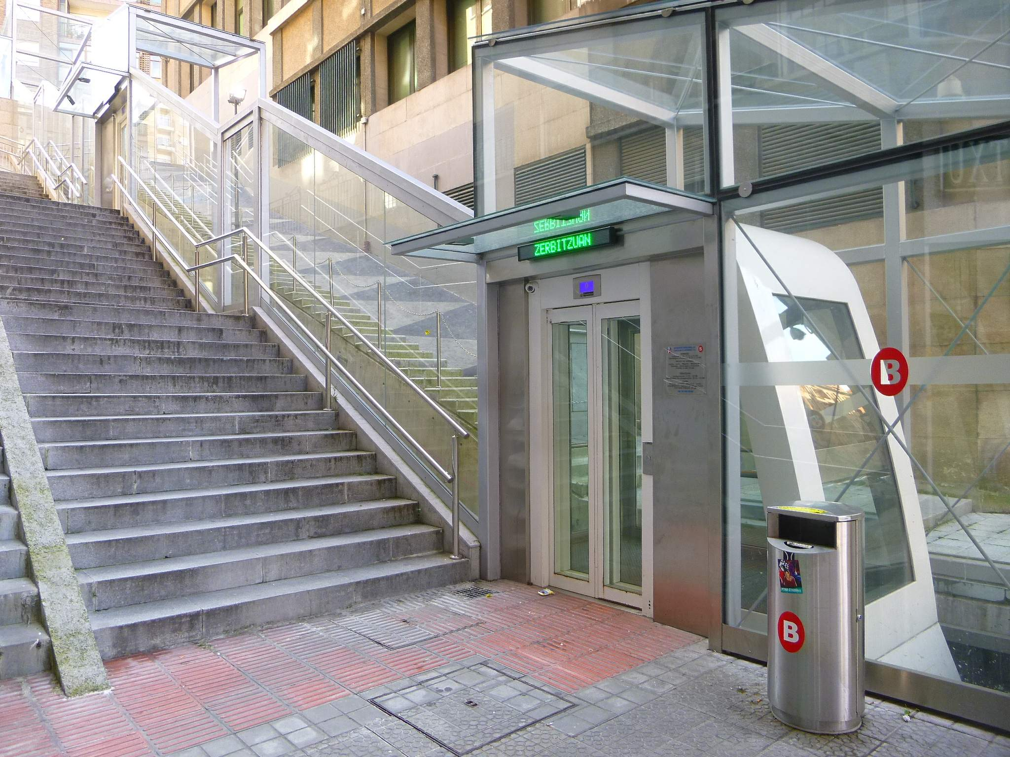 Bilbao - barrio de Santuxu, Ascensor de Iturribide-Zabalbide